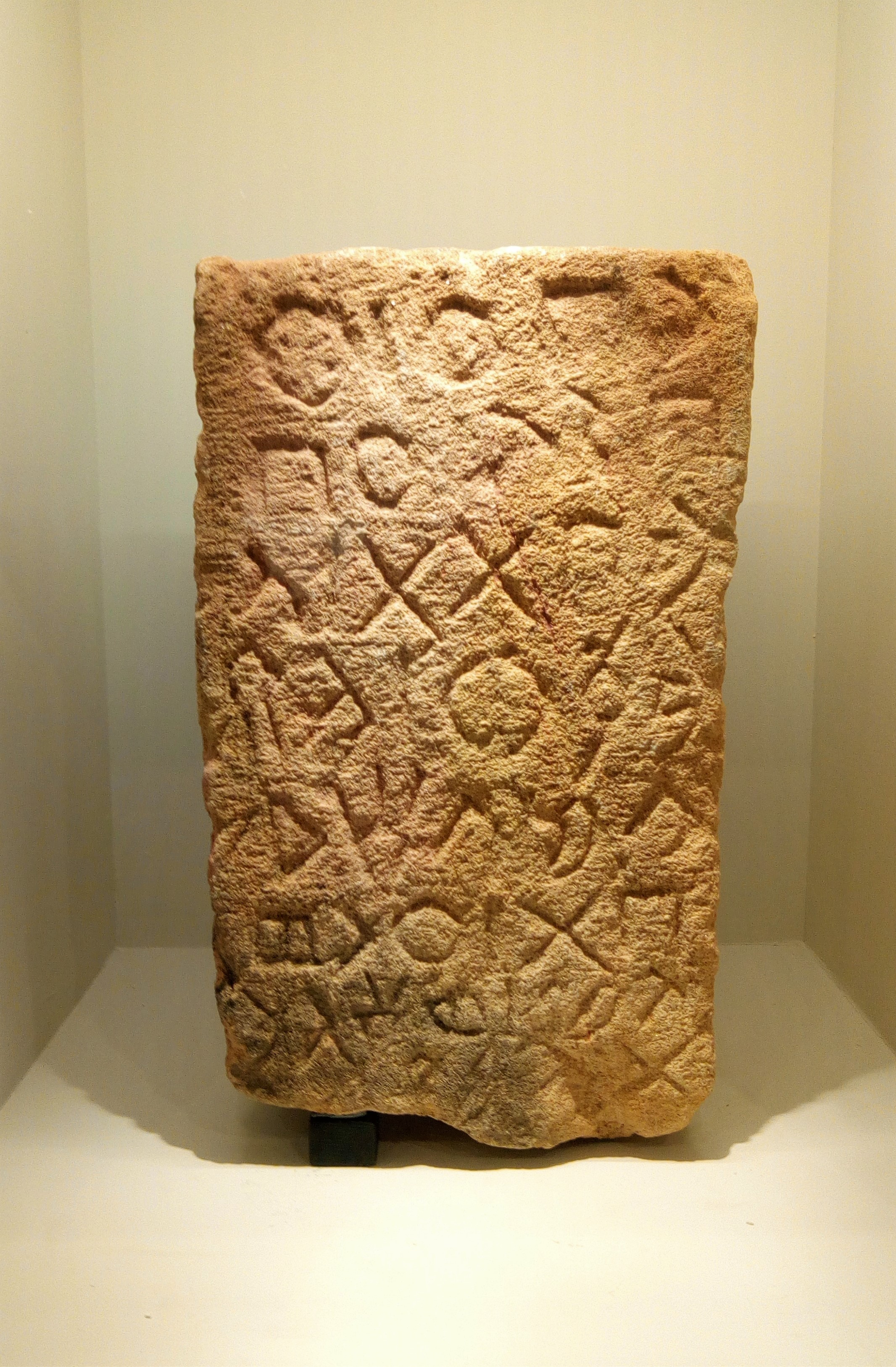 Stèle inscrite en minéen, al-'Ula. Daté des VIe-IIe siècles av. J.-C. Grès rouge. Présenté à l'Institut du Monde Arabe de Paris pour l'exposition sur Al-'Ula, prêt du Musée d'archéologie et de patrimoine populaire d'al-'Ula. Traduction : "Raba' et Bashah 'Abd Battah ont offert une idole à Dhû Ghaybah, il est satisfait d'eux et de leurs autres vies". Témoignage de la présence d'une communauté d'Arabie du Sud dans l'oasis d'al-'Ula.